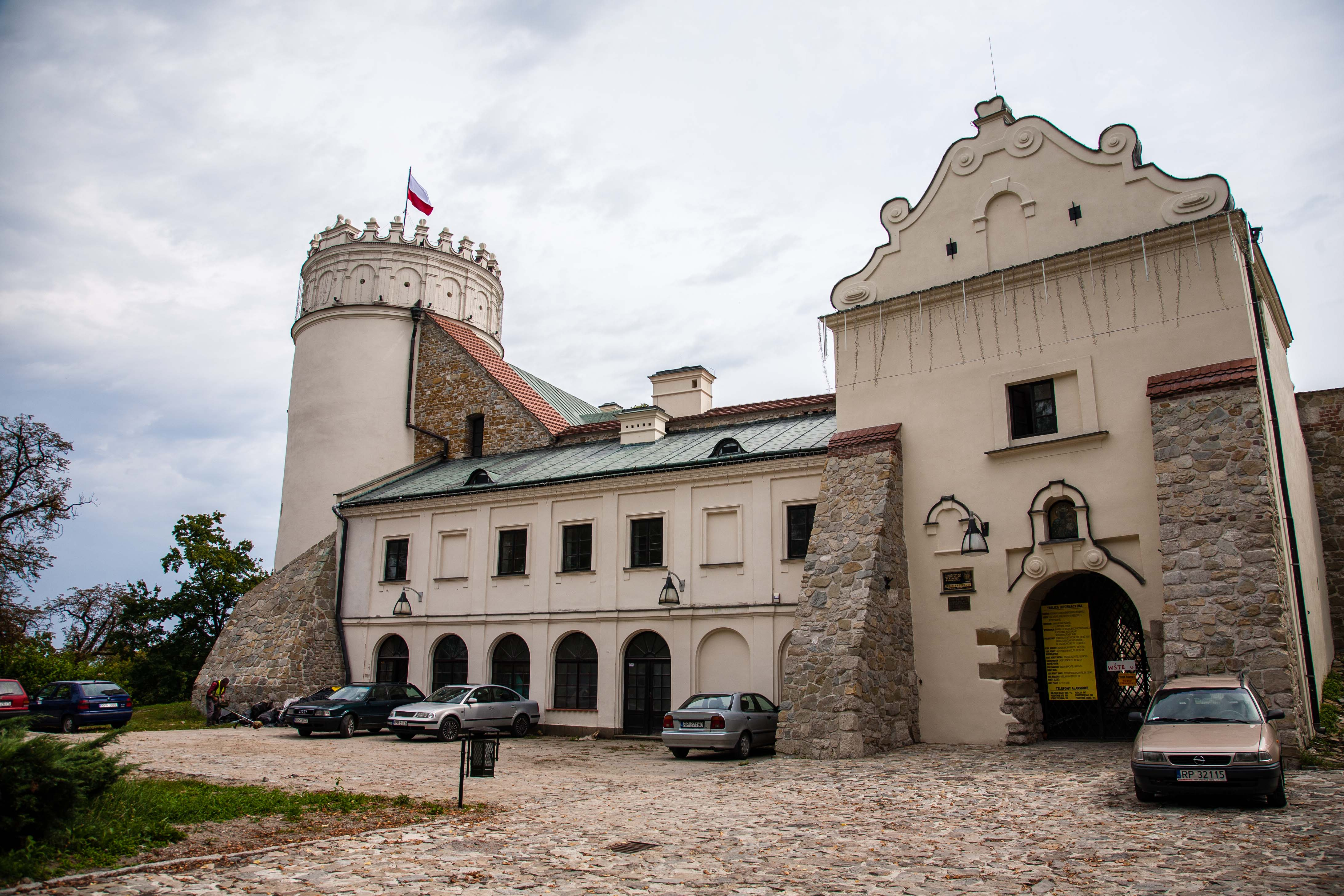 zespół zamkowy Skrzydło północne zamku, mur., XIV, XVIII, XX Budynek bramny Mury z basztami, mur. Fundamenty rotundy i palatium, mur., X-XI Park Przemyśl, Przemyśl 05.1960.